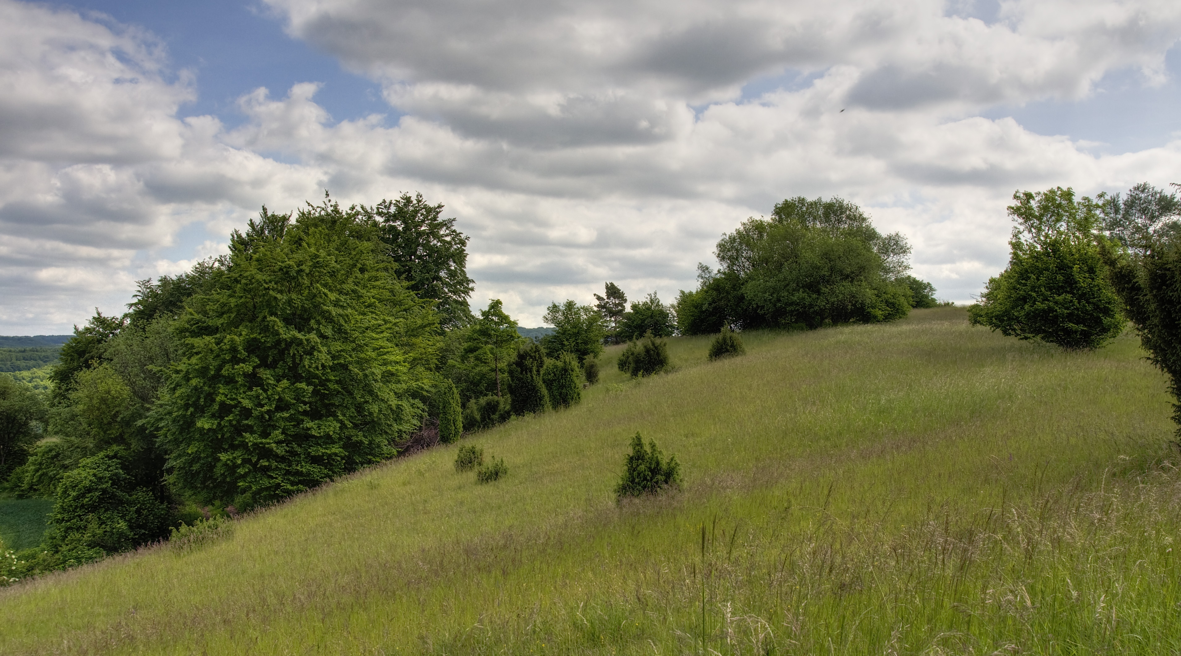 Am Jakob-Kneip-Berg bei Pesch, NSG „Eschweiler Tal und Kalkkuppen“, Bad Münstereifel, Nordrhein-Westfalen